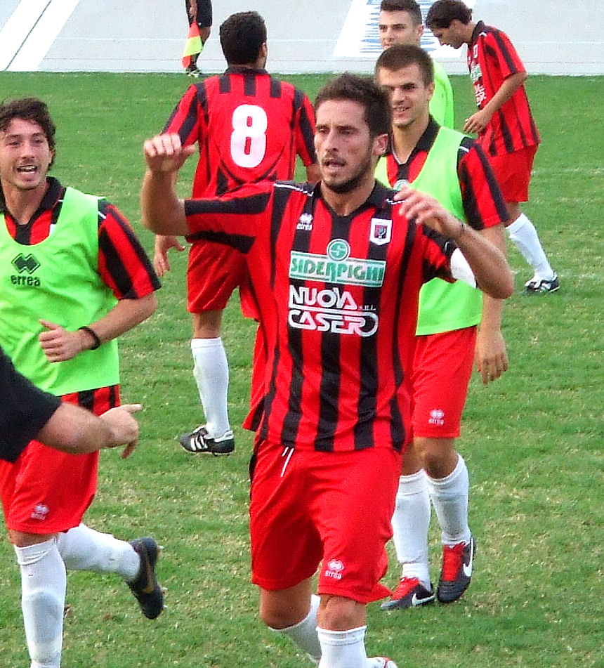 Dennis Piva, capitano del Fiorenzuola Calcio festeggia un gol segnato